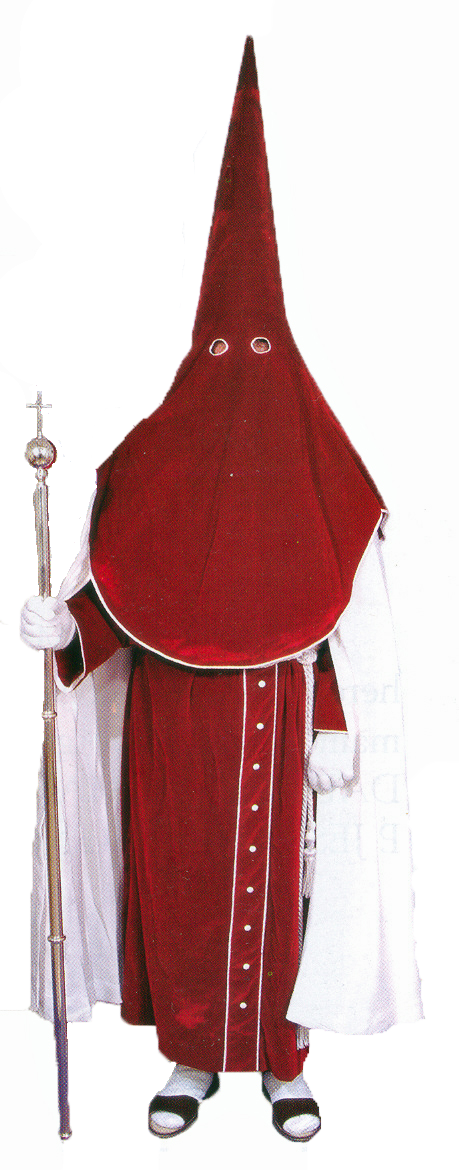 Hábito de la Hermandad de San Juan Evangelista de Ocaña (Toledo)